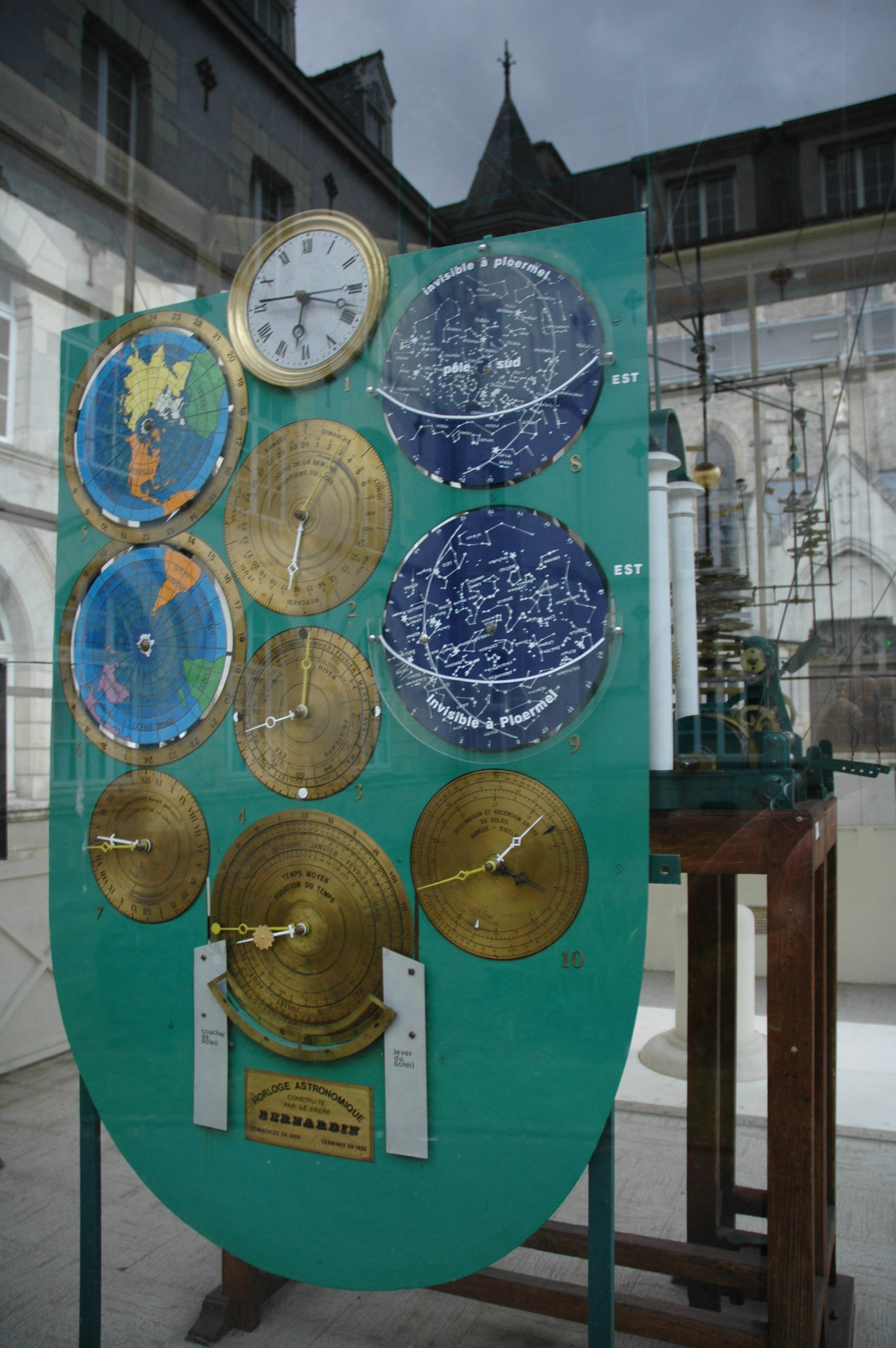 Ploërmel (Morbihan, France) - Horloge astronomique construite entre 1850 et 1855 par le frère Bernardin Morin (1812-1876), protégée par un kiosque vitré dans la cour de la Maison-Mère des Frères de Ploërmel (actuel Lycée La Mennais).